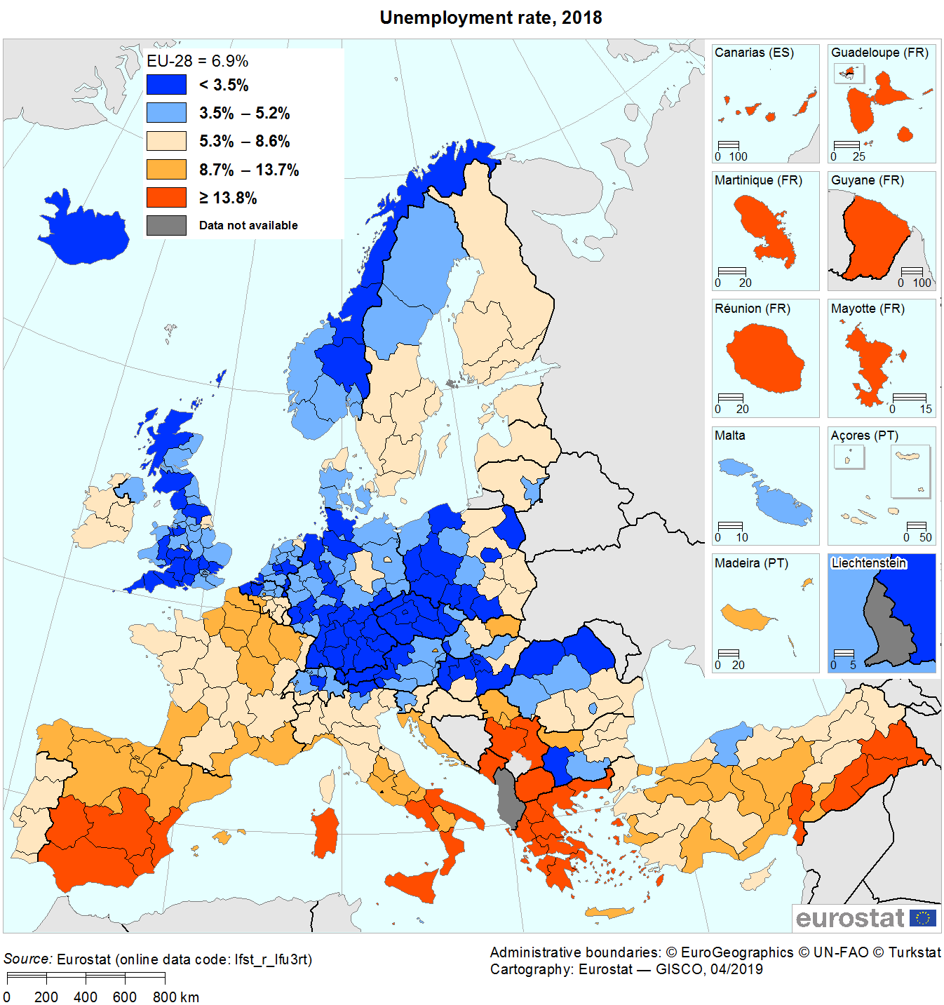 2018年のEU諸国の失業率